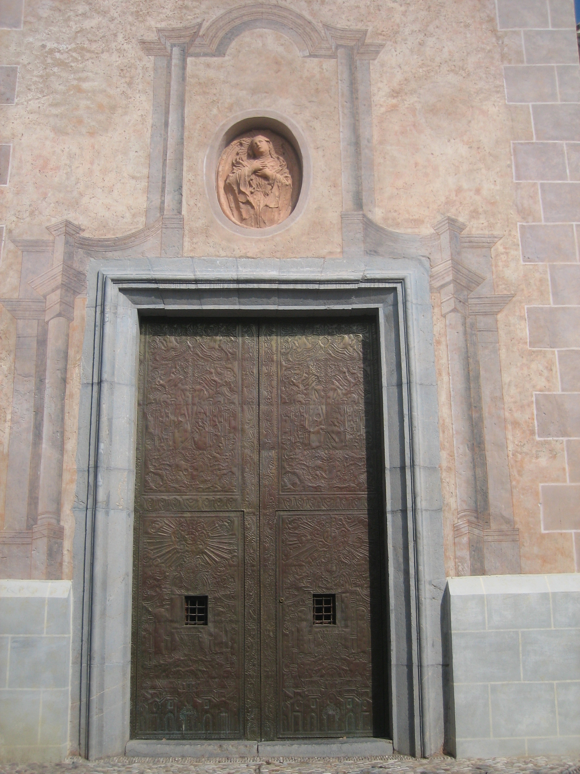 Portada de l'ermita del Calvari de Betxí (Plana Baixa)